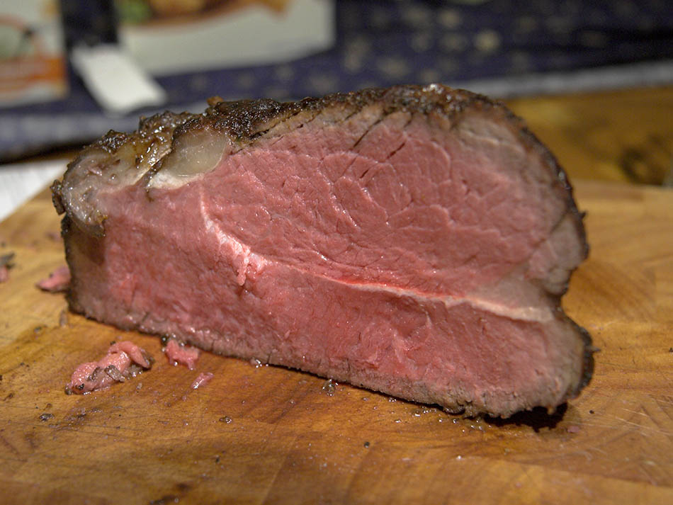 Typisch zubereitetes Roastbeef. Foto: Timo Sack.